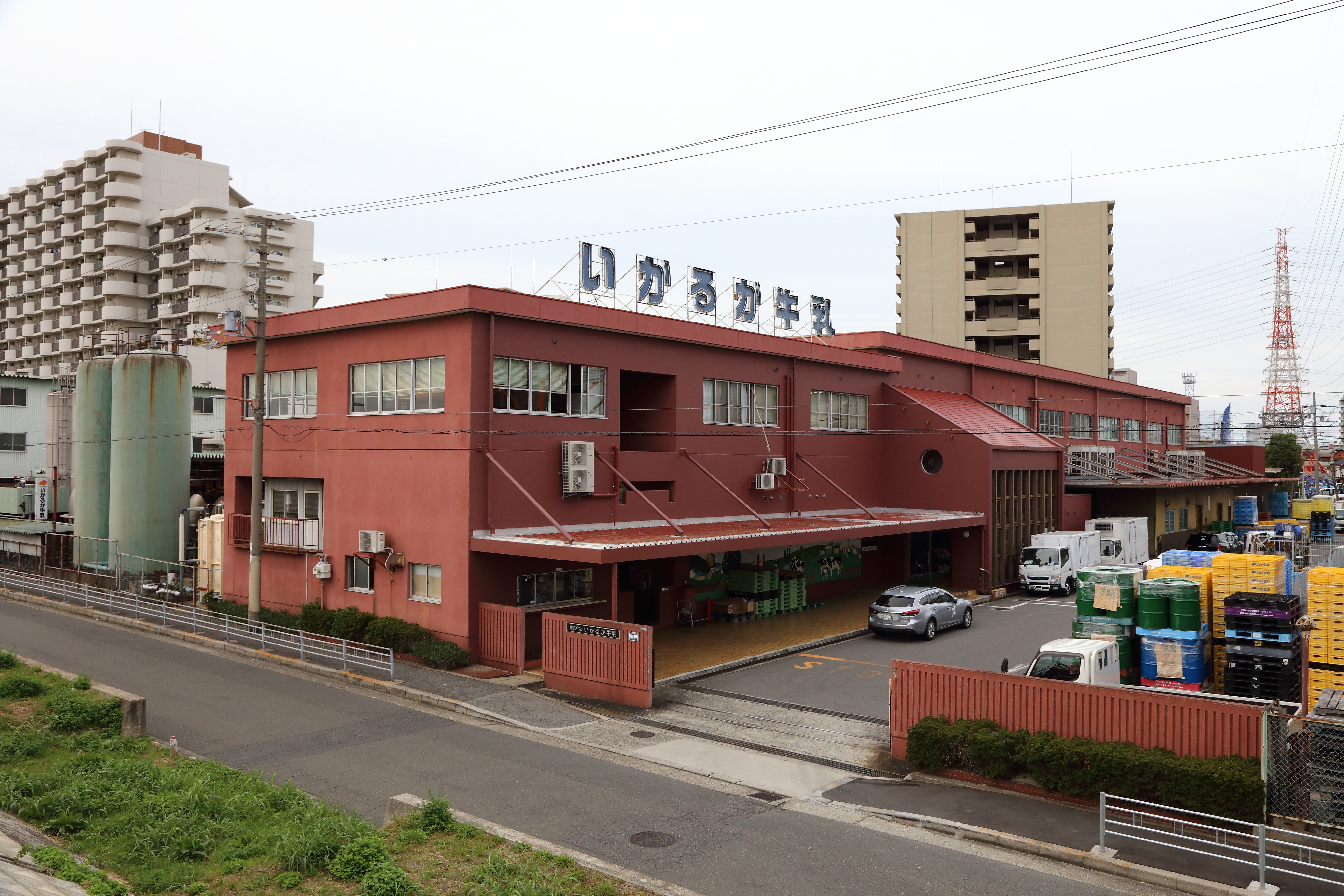 いかるが牛乳 大阪府大阪市住之江区新北島4丁目